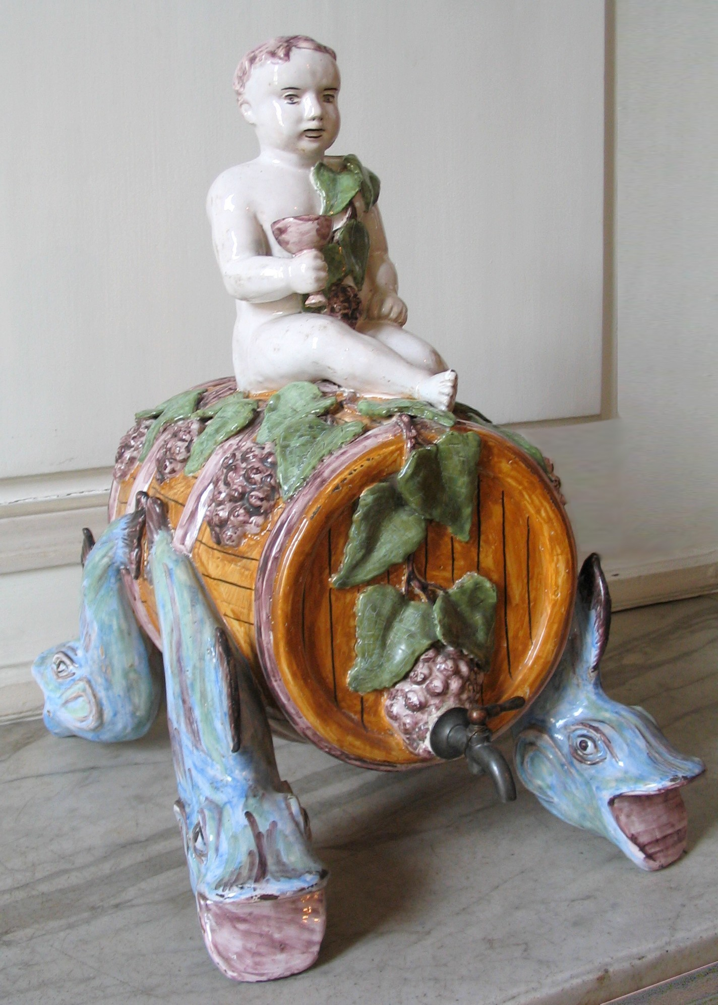 Pièce de forme en faïence de Bordeaux, Manufacture Geo Martel, Musée des arts décoratifs de Bordeaux, France, XXe siècle.